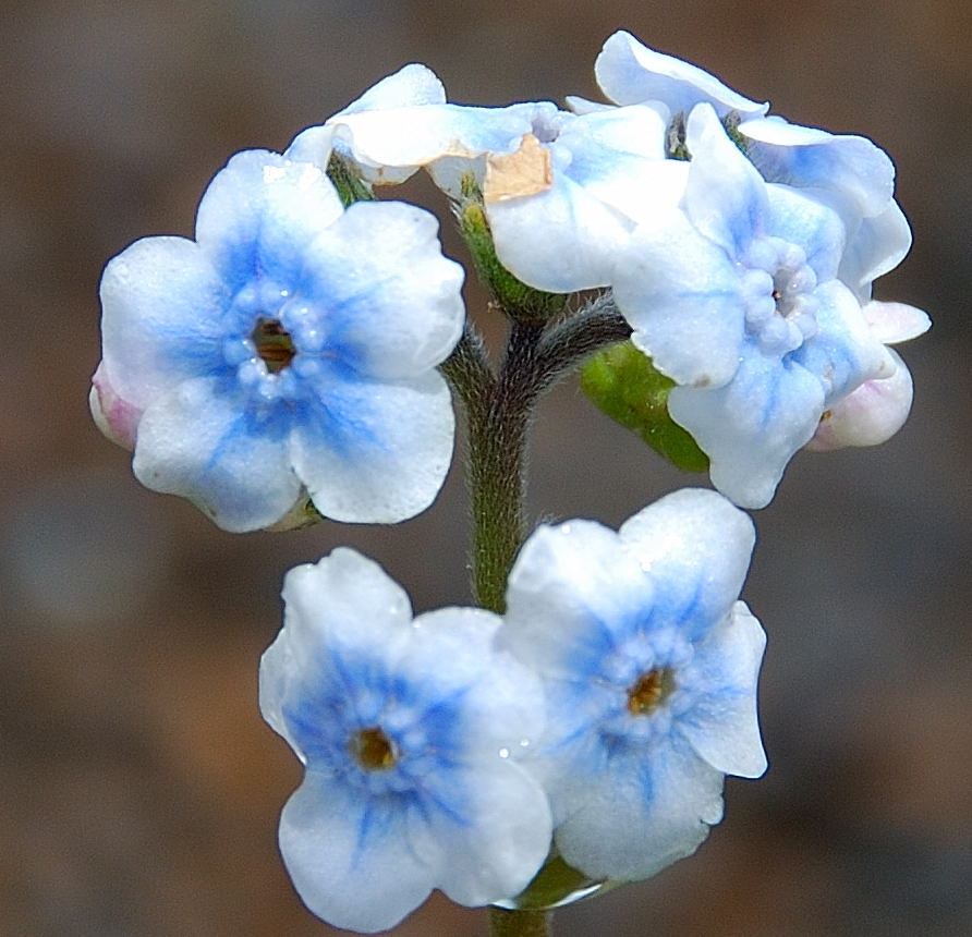 Myosotis de Bourbon , Cynoglossum borbonicum